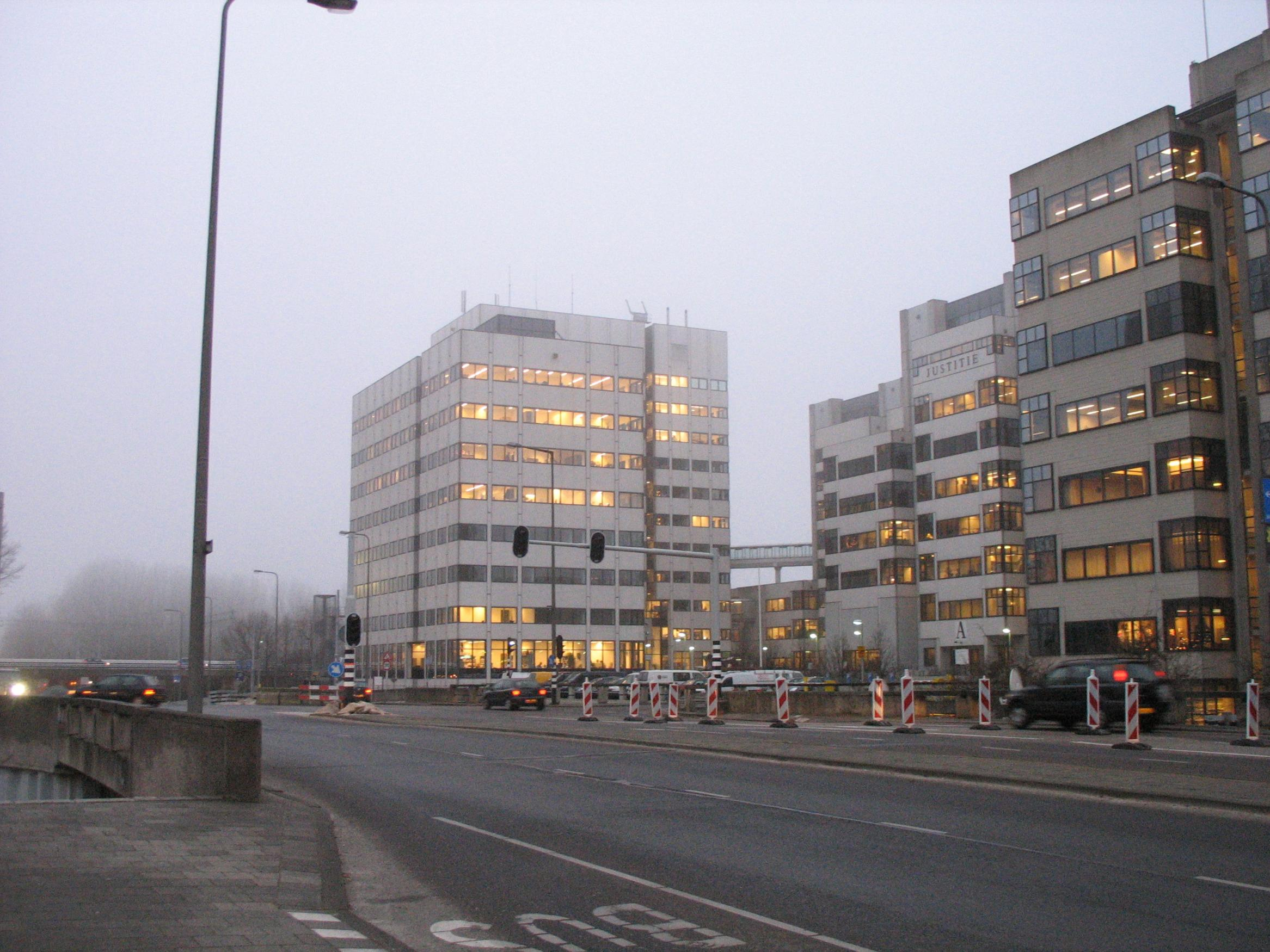 rechtbank Amsterdam - Parnassusweg